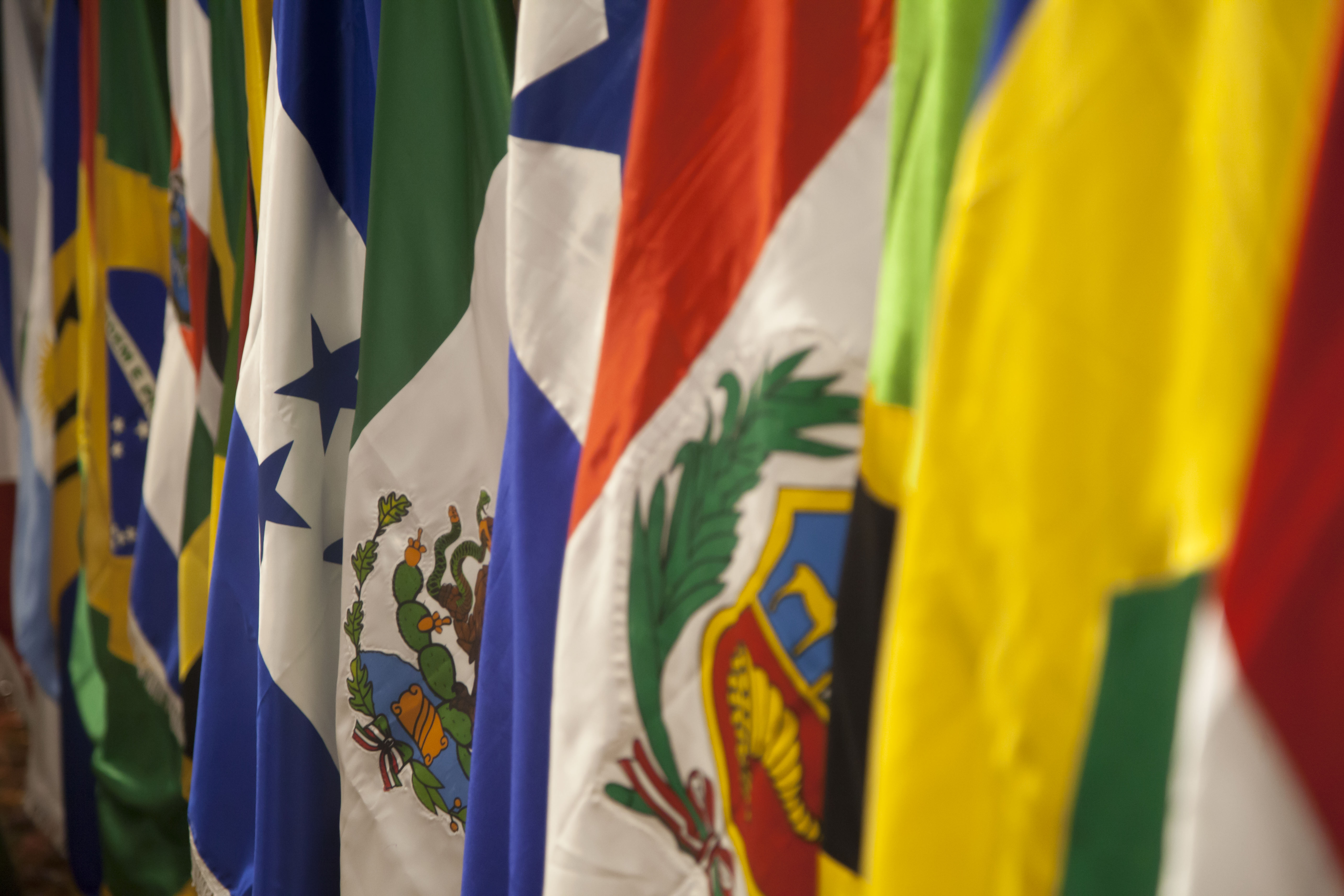 Quito, Ecuador. 03 de mayo de 2015. Reunión preparatoria de CELAC, el Vice Canciller Leonardo Arízaga preside la reunión con representantes de los 33 países miembros del organismo. Carlos Pozo Albán/Cancillería Ecuador.